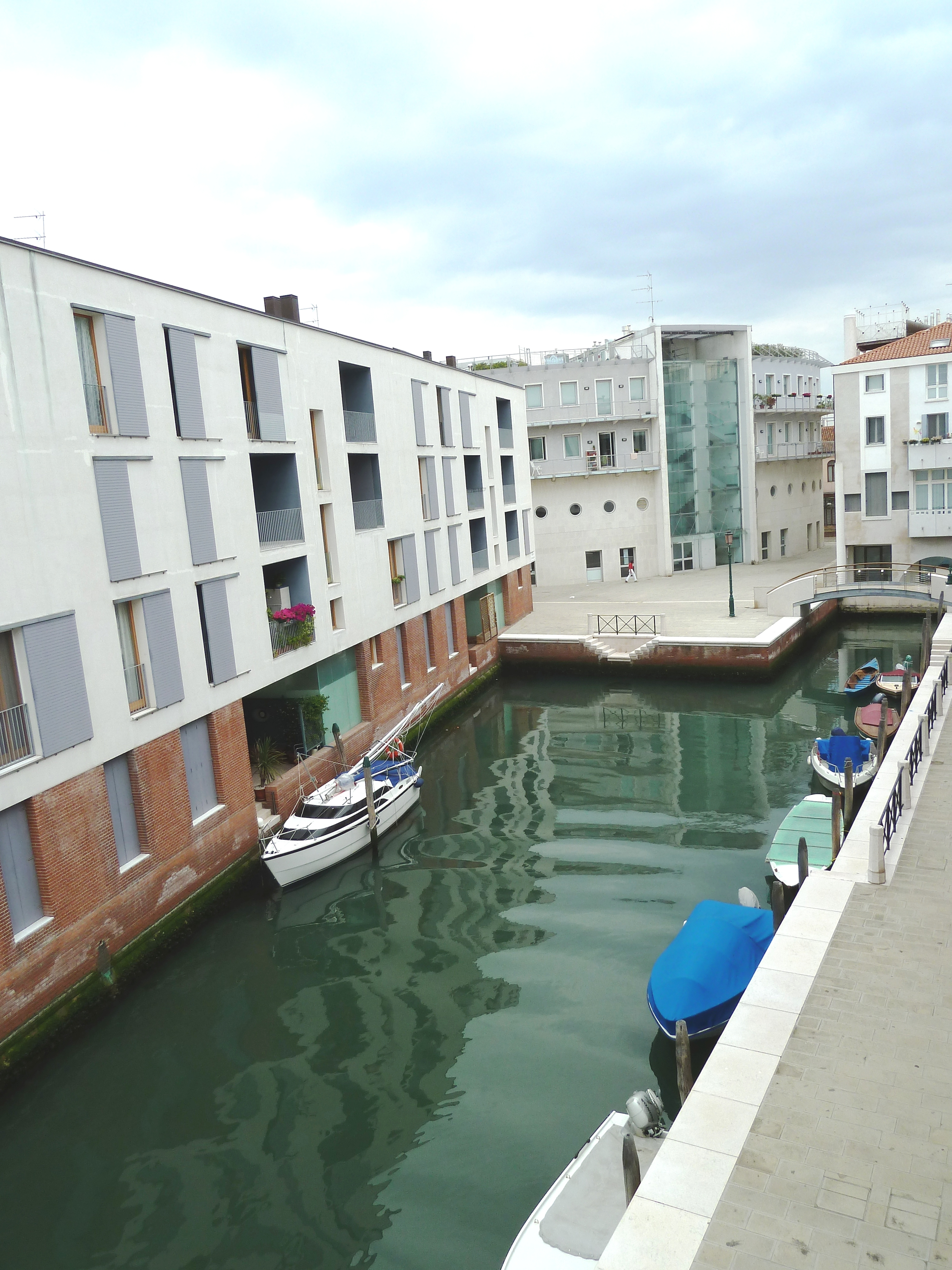 Rio dei Scorzeri (Venice)